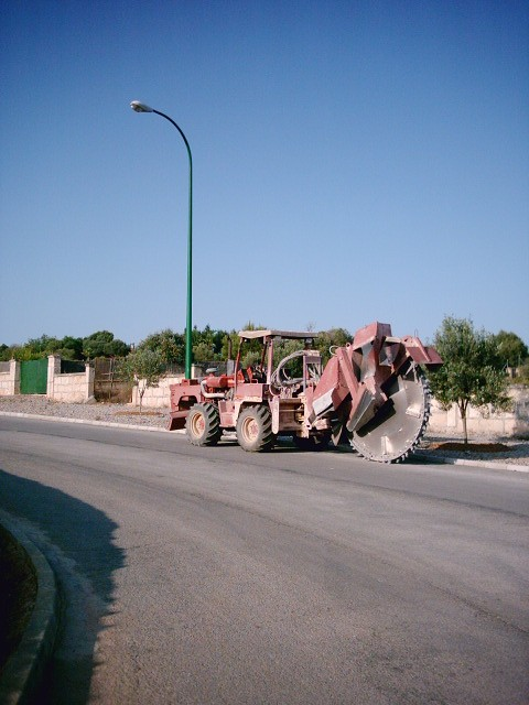 Màquina per obrir rases. Autor Plàcid Pèrez Bru, fotografia feta a dins els espais comuns de la meva comunitat de propietaris, algú ho va deixar un cap de setmana.